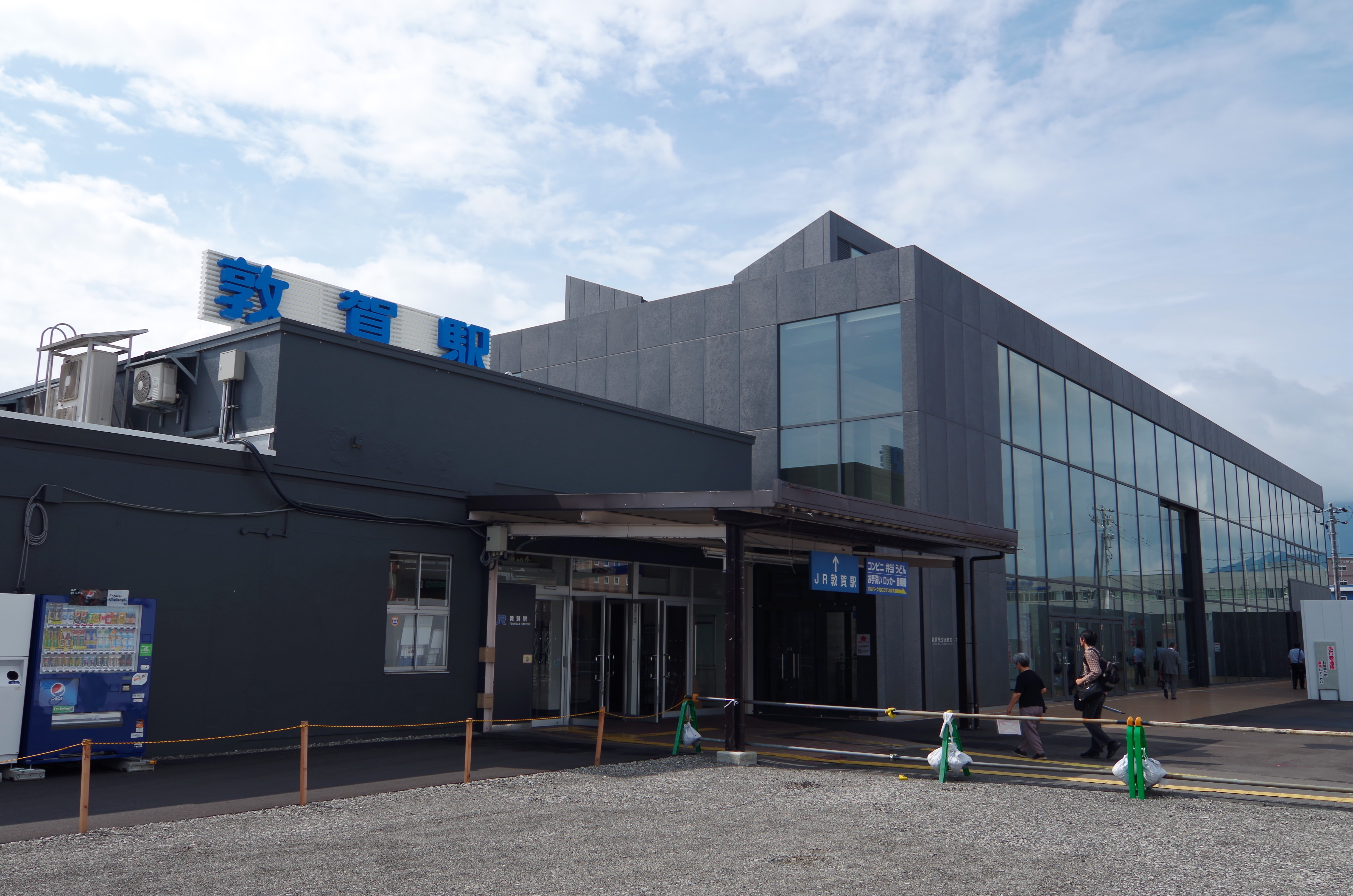 JR北陸本線 敦賀駅 Tsuruga sta. 2014.8.25